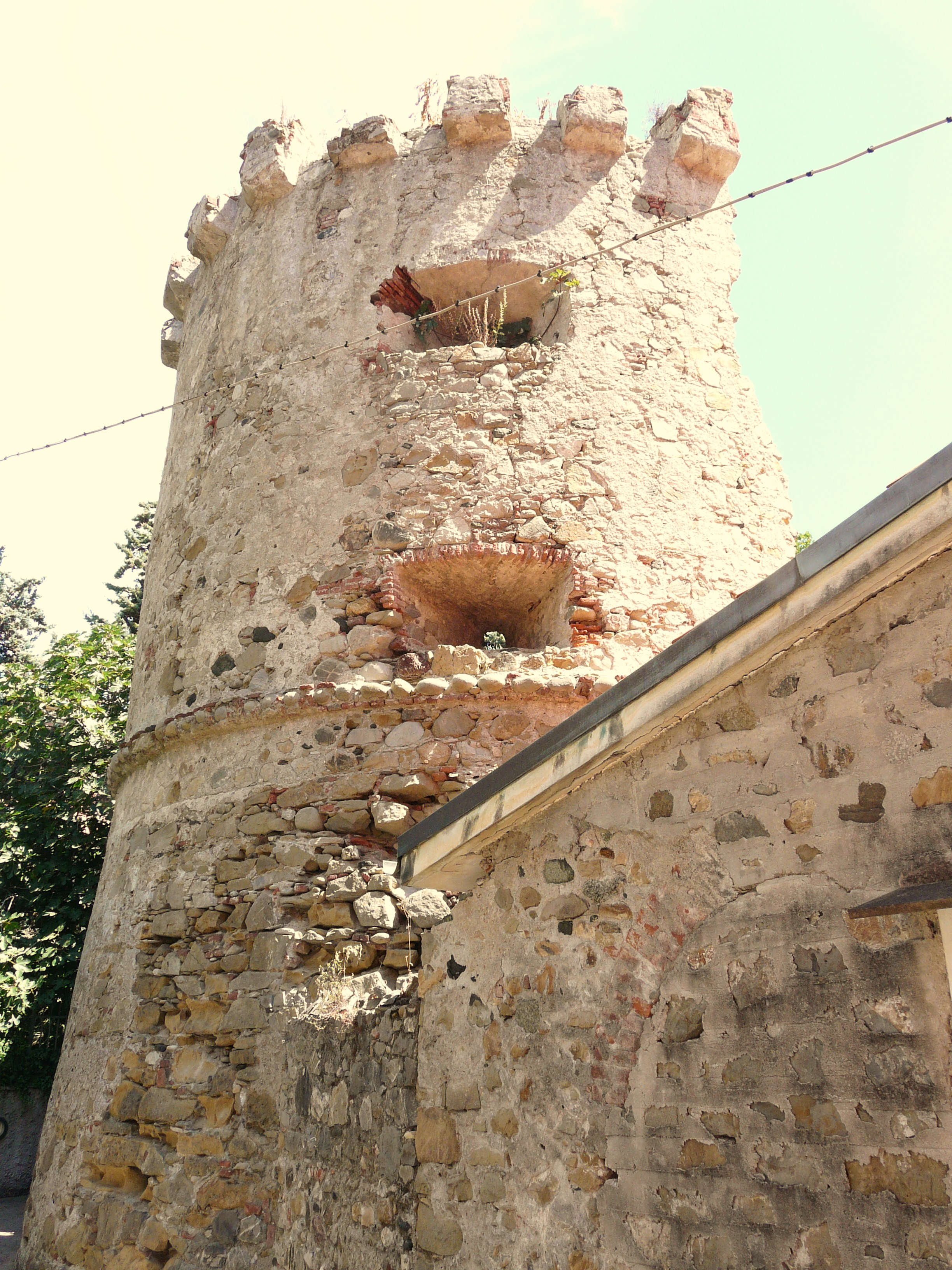 Torre di Deiva Marina, Liguria, Italia